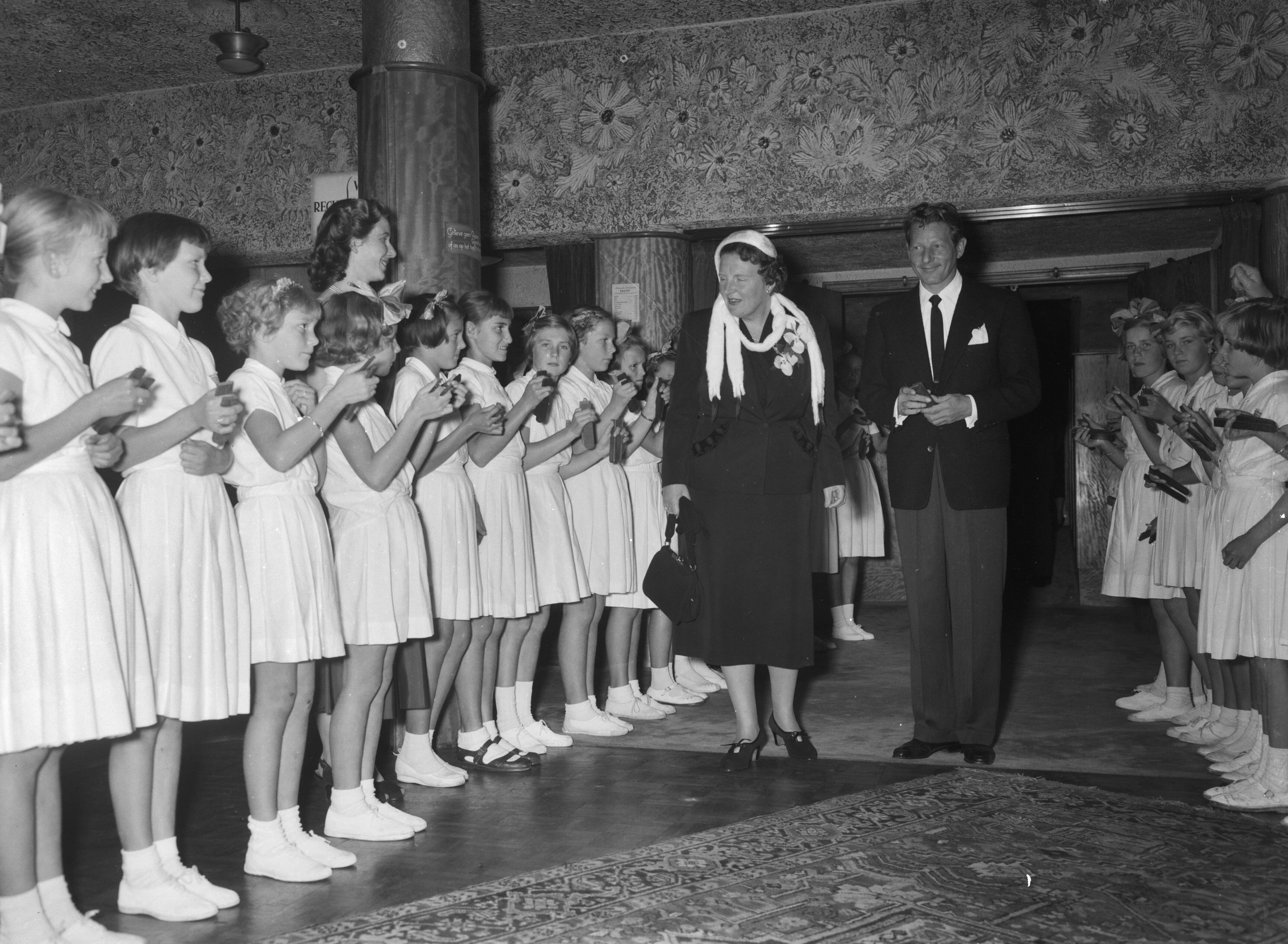 Collectie / Archief : Fotocollectie Anefo Reportage / Serie : [ onbekend ] Beschrijving : Koningin Juliana en Danny Kaye bij een uitvoering voor Unicef Datum : 6 oktober 1955 Trefwoorden : koningin, uitvoeringen Persoonsnaam : Juliana (koningin Nederland), Kaye, Danny Instellingsnaam : UNICEF Fotograaf : Noske, J.D. / Anefo Auteursrechthebbende : Nationaal Archief Materiaalsoort : Negatief (zwart/wit) Nummer archiefinventaris : bekijk toegang 2.24.01.04 Bestanddeelnummer : 907-3714 Reacties Geplaatst door Maaike op 05 januari 2013 - 11:59. kinderkoor Haagse Ooievaartjes. Locatie: Metropole-theater Plaats: Den Haag; Zuid Holland